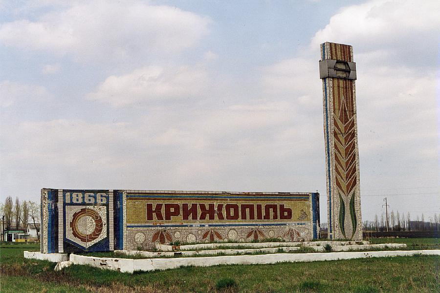 Kryzhopil entry sign